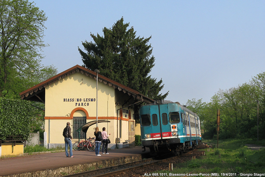 Stazione ferroviaria di Biassono-Lesmo Parco.